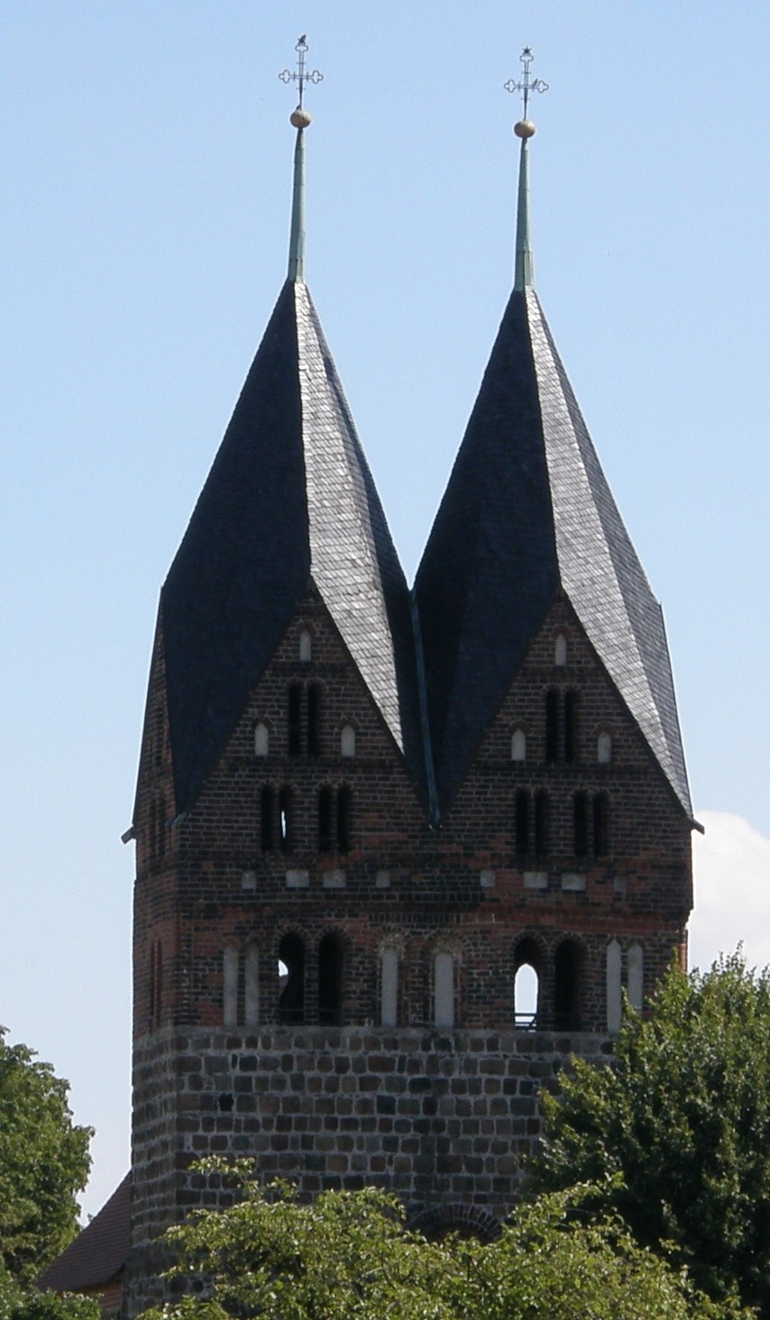 Lugau (Doberlug-Kirchhain), Kirche mit zwei Turmspitzen